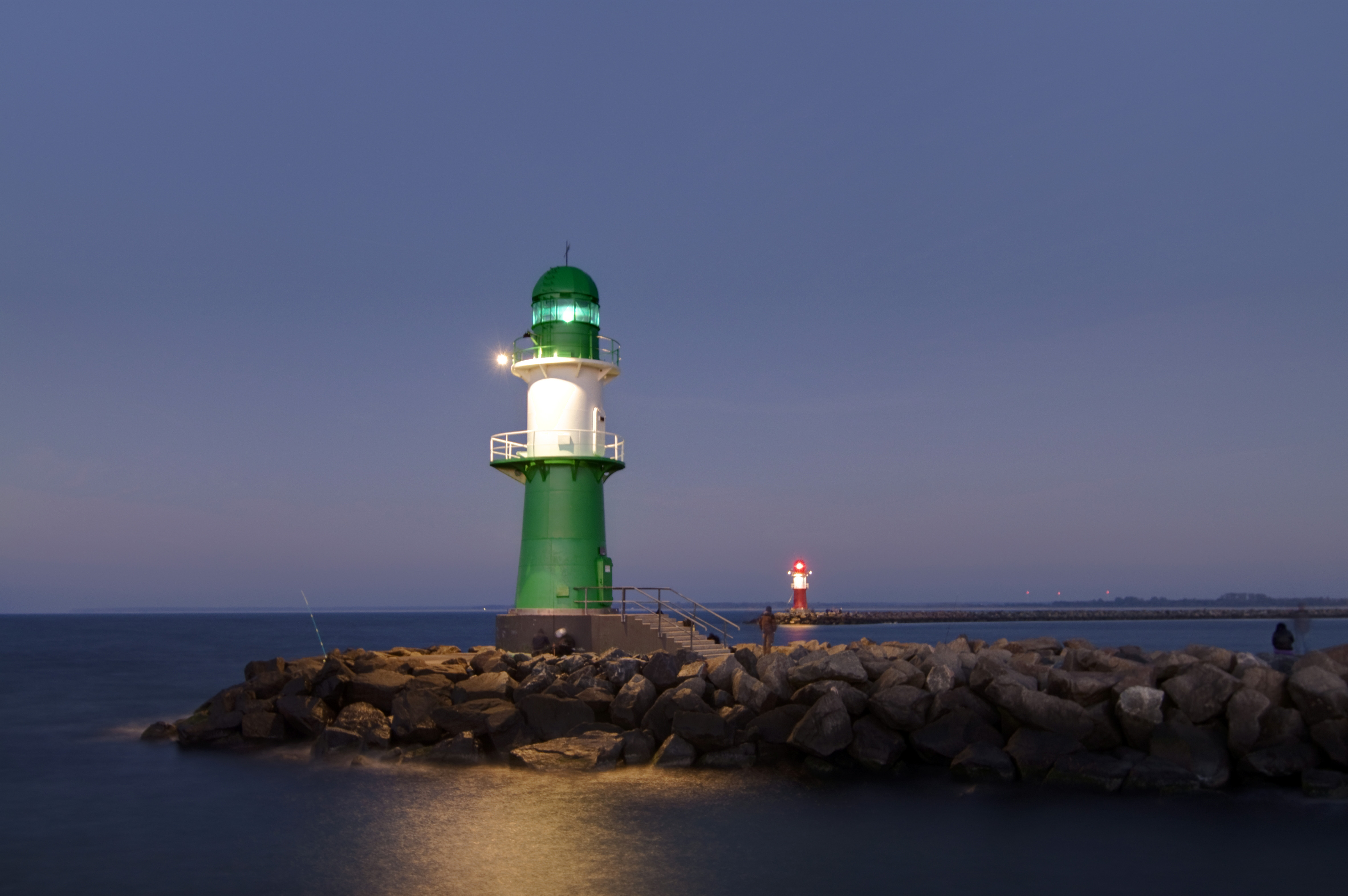 West- und Ostmole in Warnemünde, Rostock